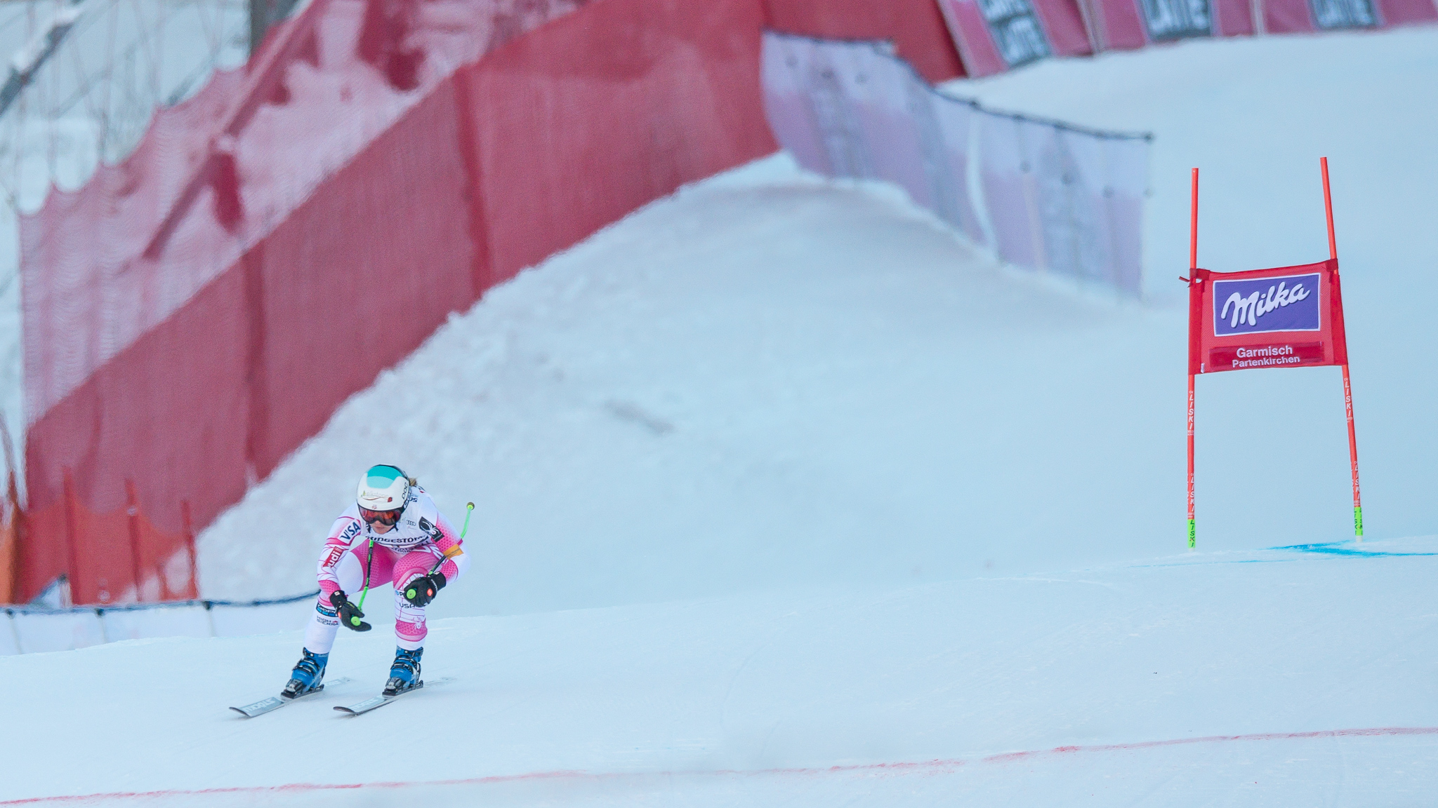 64. Kandahar Rennen,Anna Marno,Audi FIS Ski Weltcup Garmisch-Partenkirchen,Damen Super-G,Kandahar,Ladies Super-G